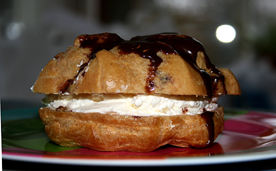 Íslensk vatnsdeigsbolla